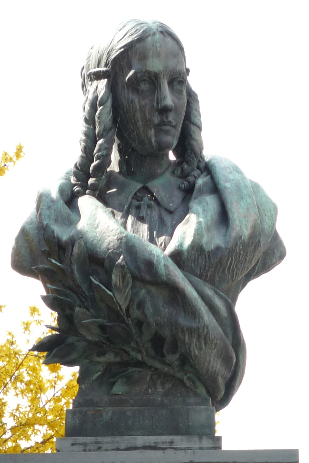 Büste zu Ehren von Annette Droste-Hülsoff vor der Burg Meersburg. Geschaffen nach dem Denkmal von Anton Rüller und Heinrich Fleige, 1896